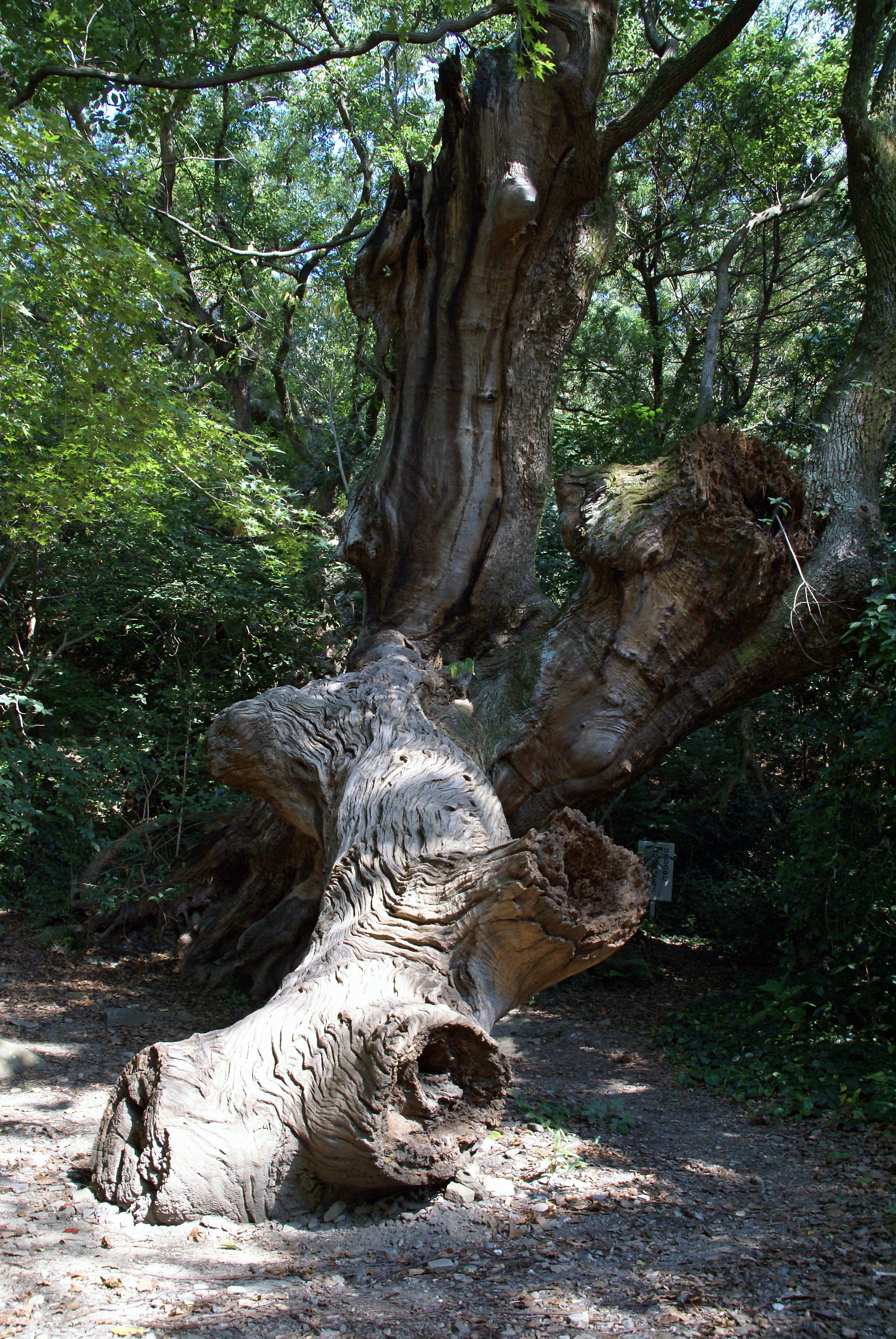 Tokushima Castle in Tokushima, Tokushima prefecture, Japan